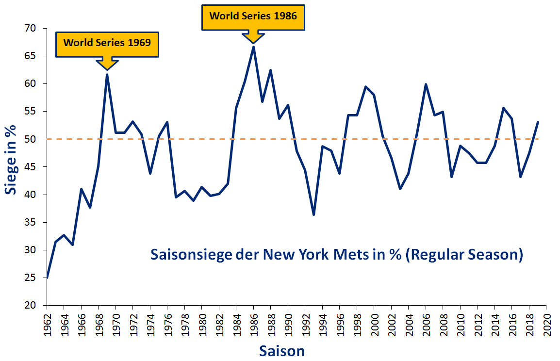 Grafische Darstellung der Siegquote der New York Mets seit Bestehen bis 2010